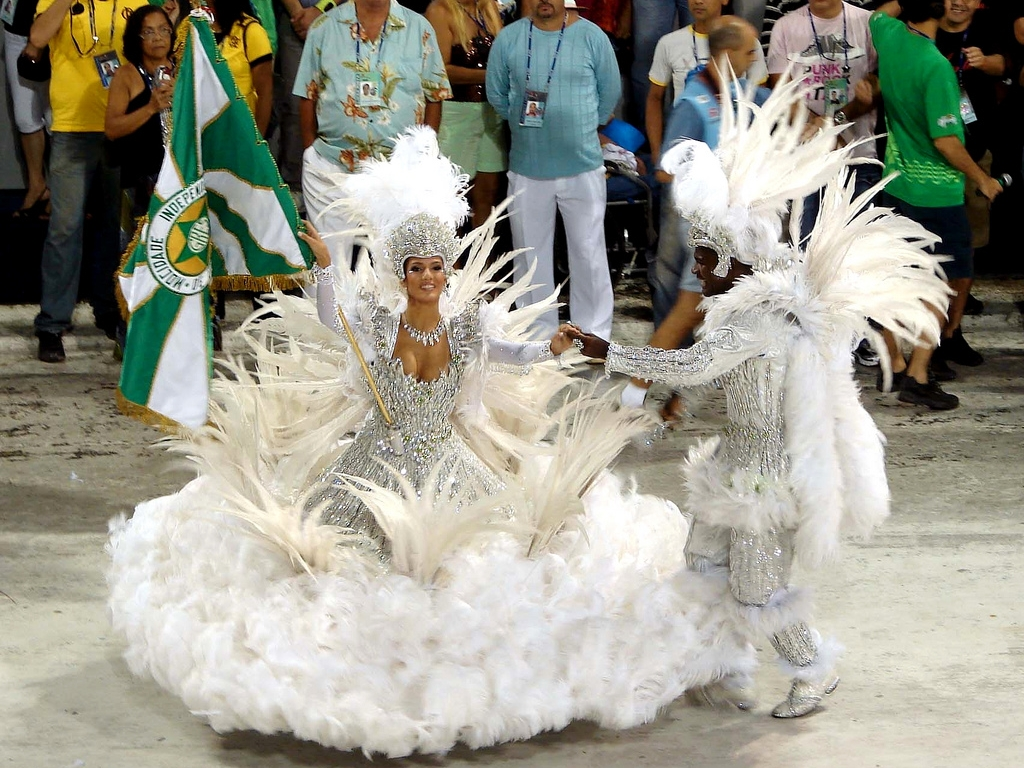 Desfile das escolas de samba do Rio de Janeiro no Sambódromo Grupo Especial Ano 2008 Escola Mocidade Foto Regina Santelli